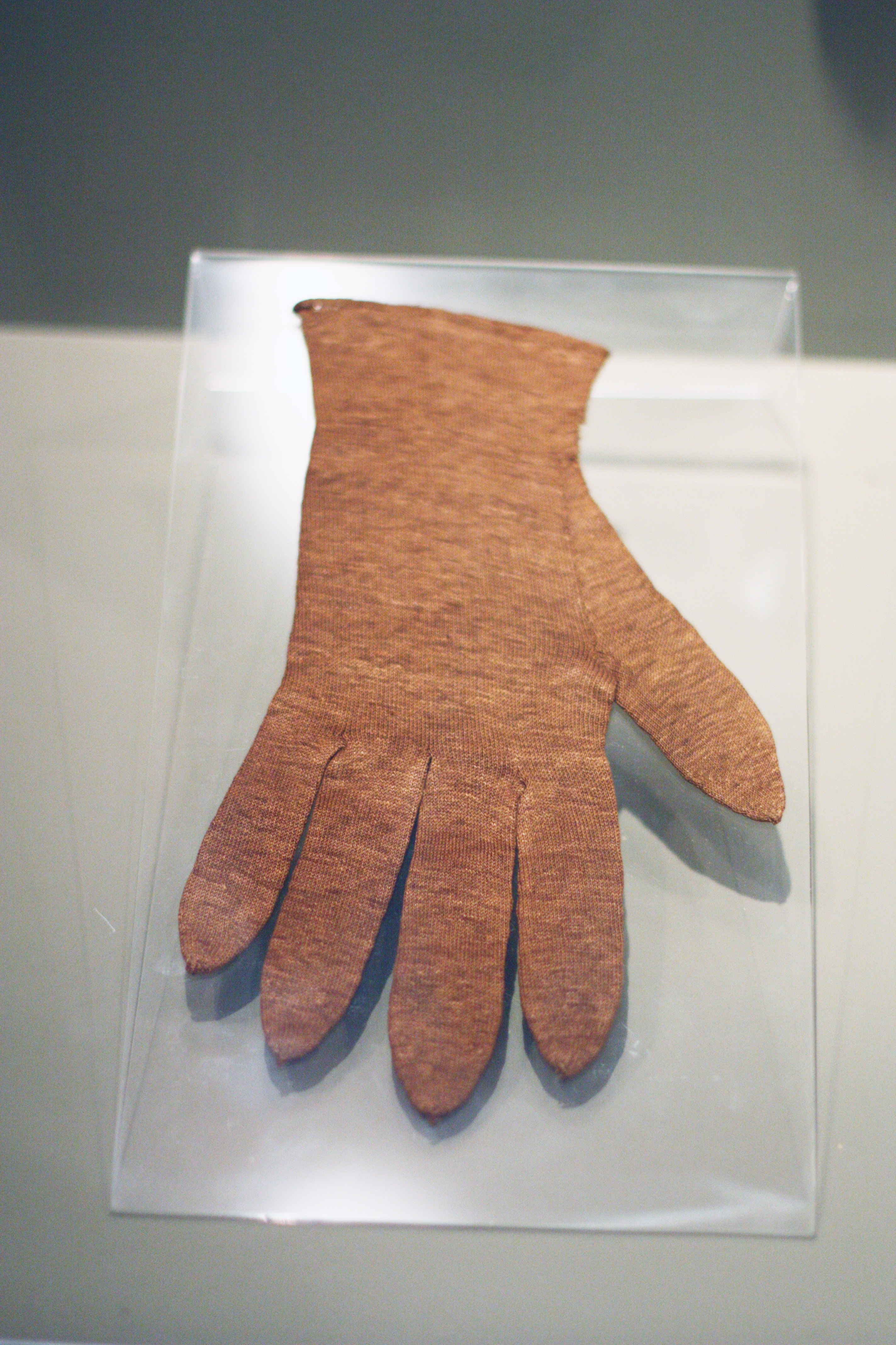 Glove (Byssusseide) im Überseemuseum Bremen